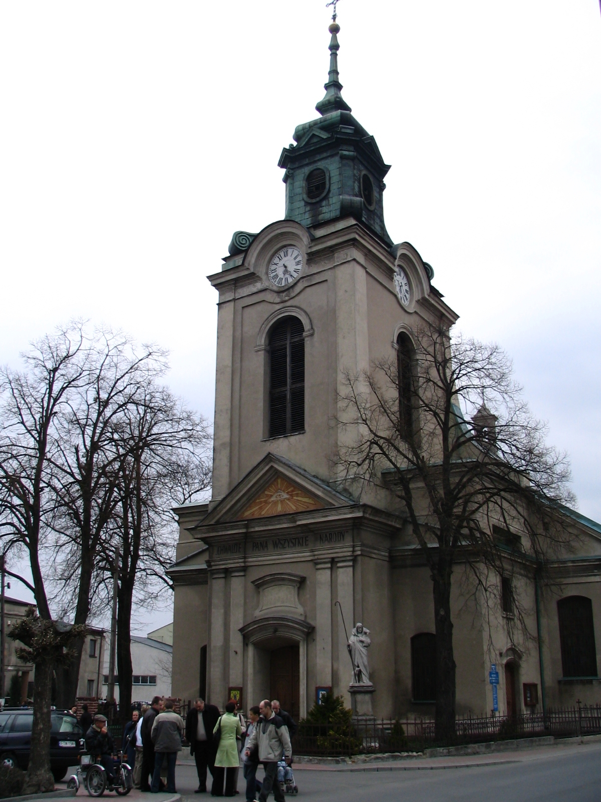 St. Mikolaj Church in Wolbórz